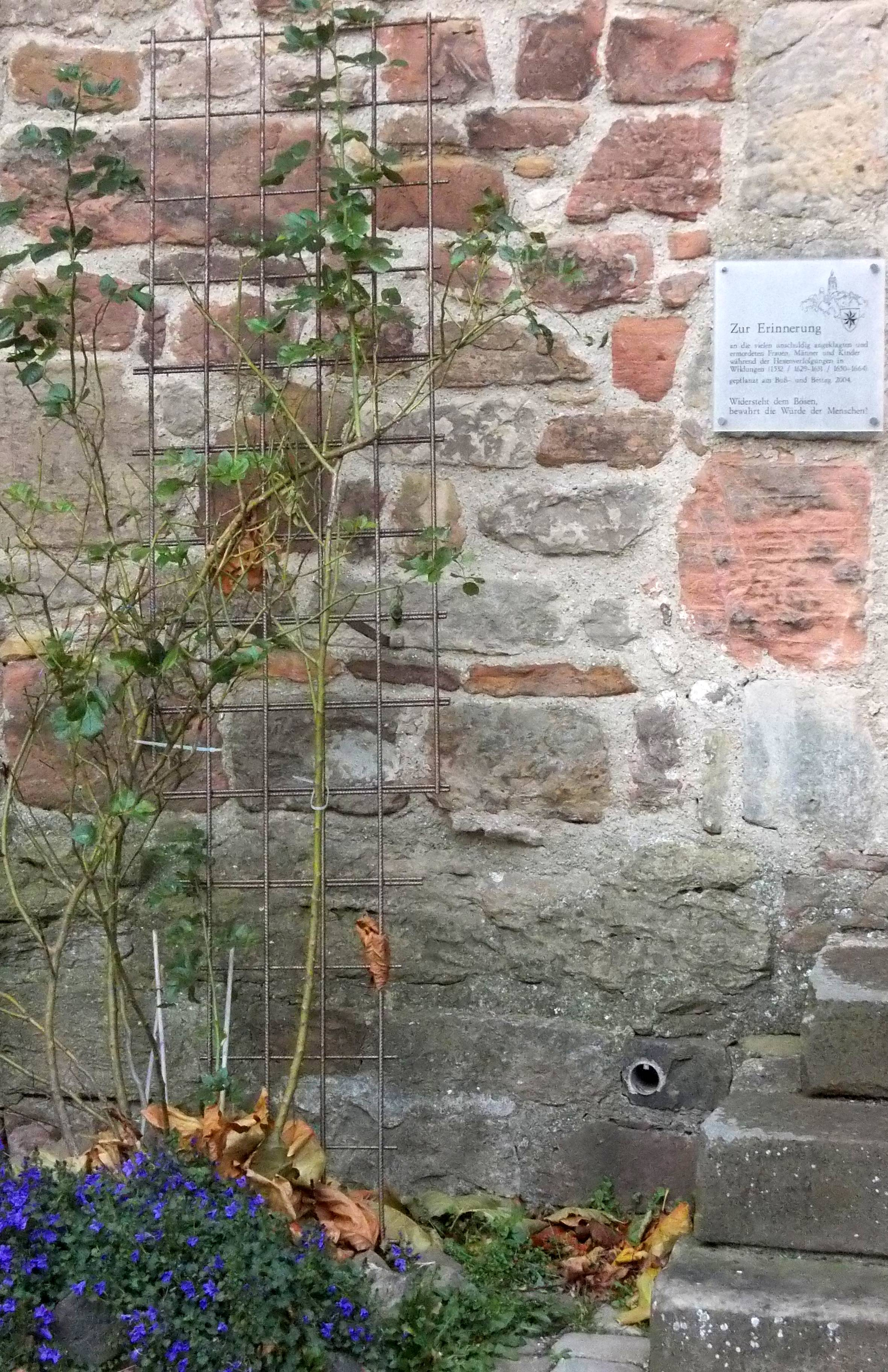 Erinnerung an die Hexenverfolgungen in Bad Wildungen, angebracht an der Wand der Stadtkirche wildungen.